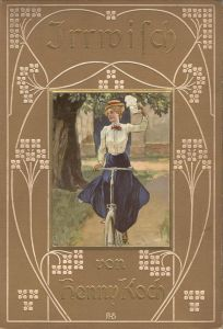 Buchcover des Werkes "Irrwisch" von Henny Kochh